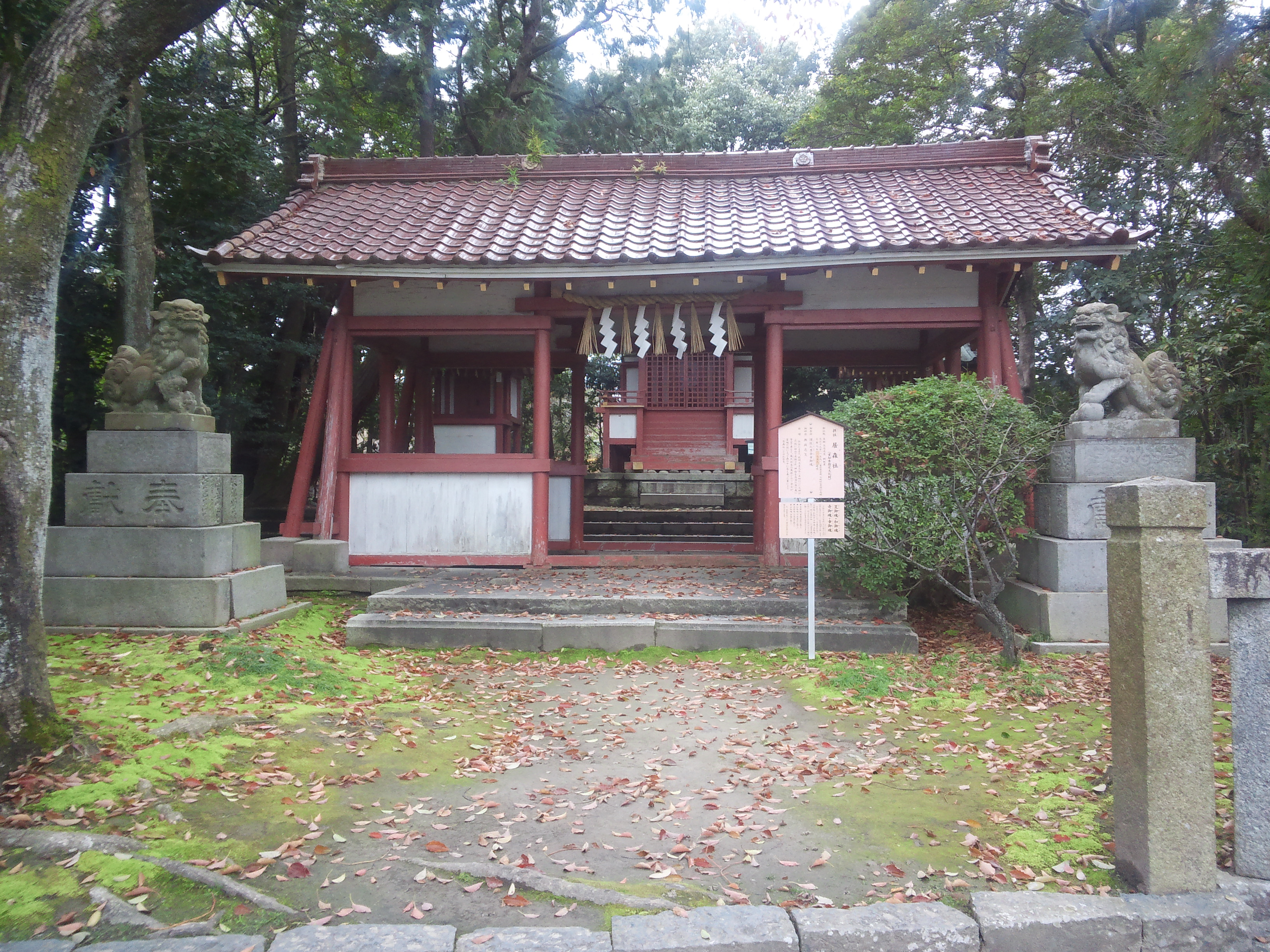 津島神社 - 居森社